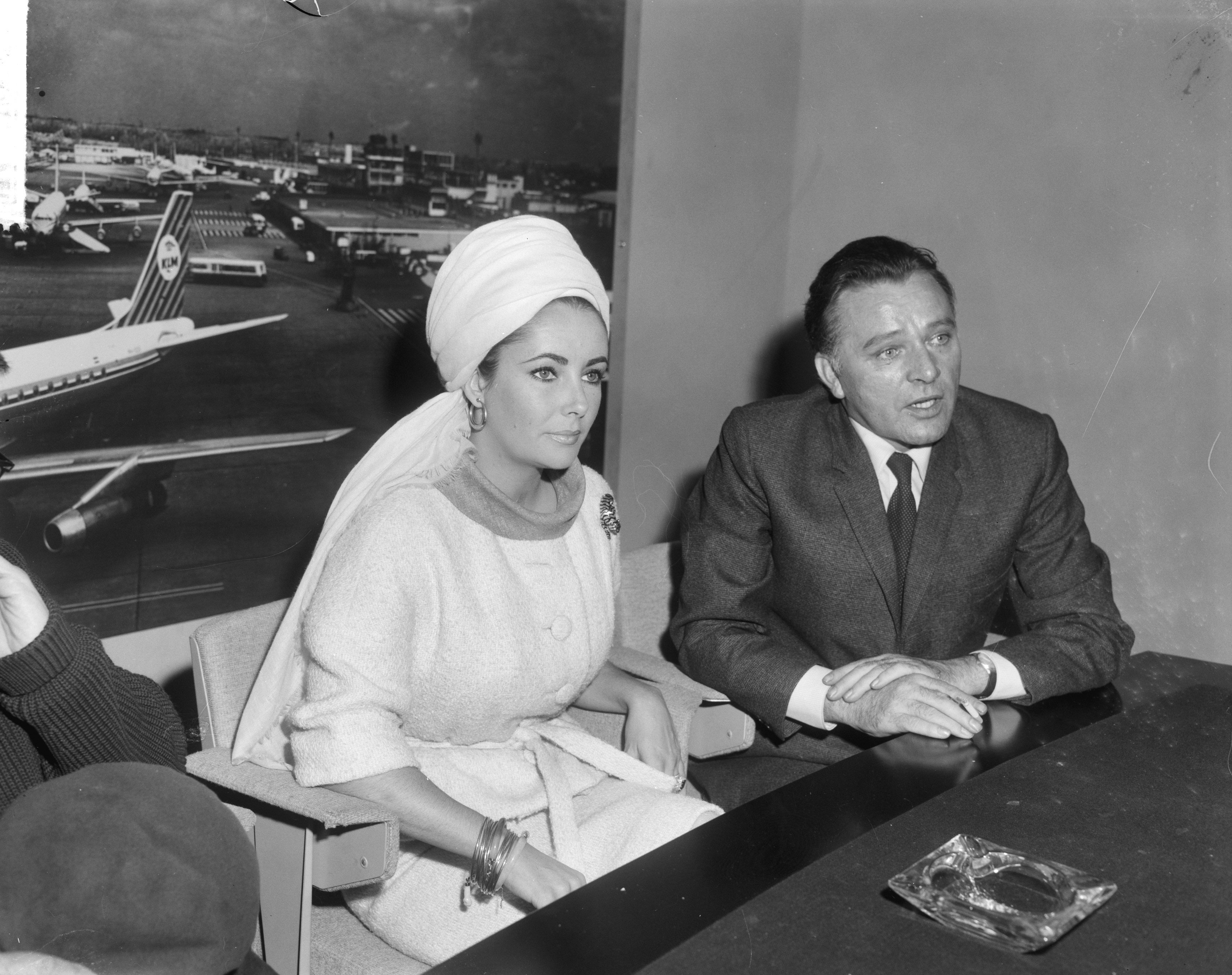 Collectie / Archief : Fotocollectie Anefo Reportage / Serie : [ onbekend ] Beschrijving : Liz Taylor en Richard Burton bij aankomst op Schiphol, waar zij een persconferentie geven [betreft film "The spy who came in from the cold", waarin Richard Burton de hoofdrol speelde, red.]. Datum : 26 april 1965 Locatie : Noord-Holland, Schiphol Trefwoorden : acteurs, actrices, filmsterren, persconferenties, vliegvelden Persoonsnaam : Burton, Richard, Taylor, Elizabeth Fotograaf : Bilsen, Joop van / Anefo, [onbekend] Auteursrechthebbende : Nationaal Archief Materiaalsoort : Negatief (zwart/wit) Nummer archiefinventaris : bekijk toegang 2.24.01.04 Bestanddeelnummer : 917-6942